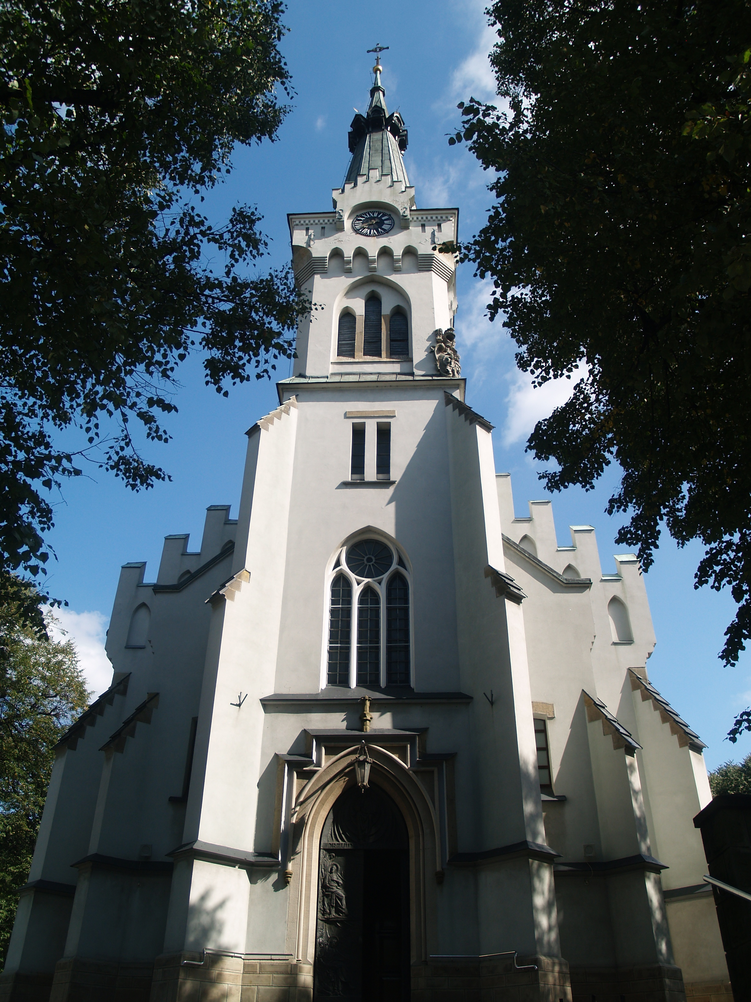 Dębica, ul. Świętej Jadwigi 9 - fasada kościoła pw. św. Jadwigi (zabytek nr A/248)